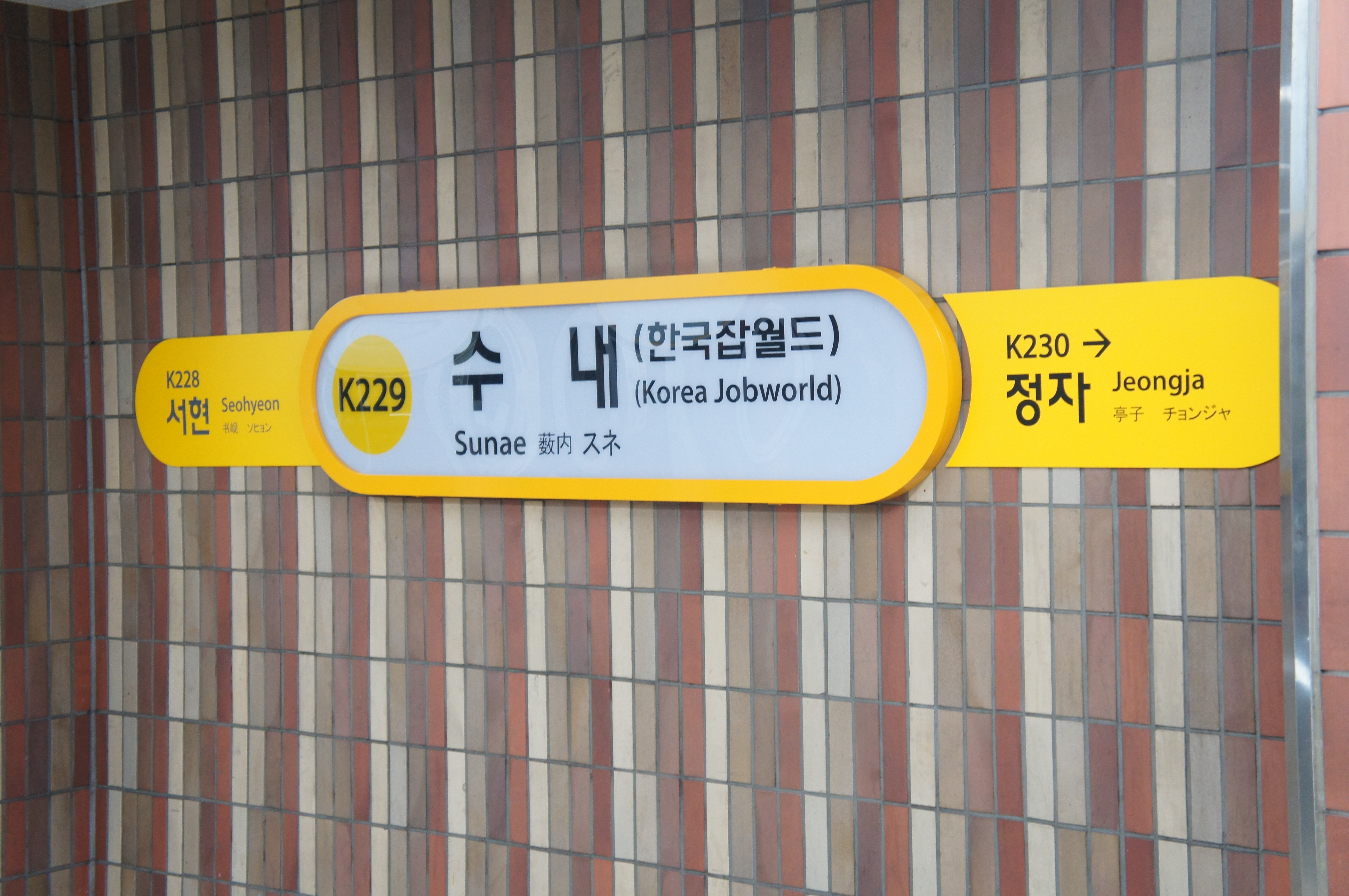 수내역 역명판